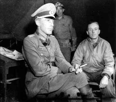 General Elfelt in 1944